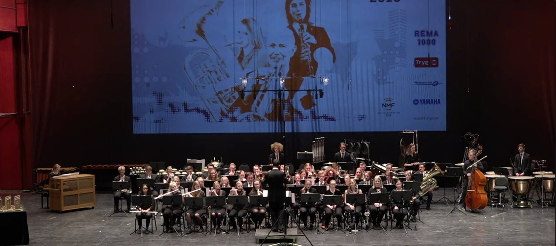 Musikkorps